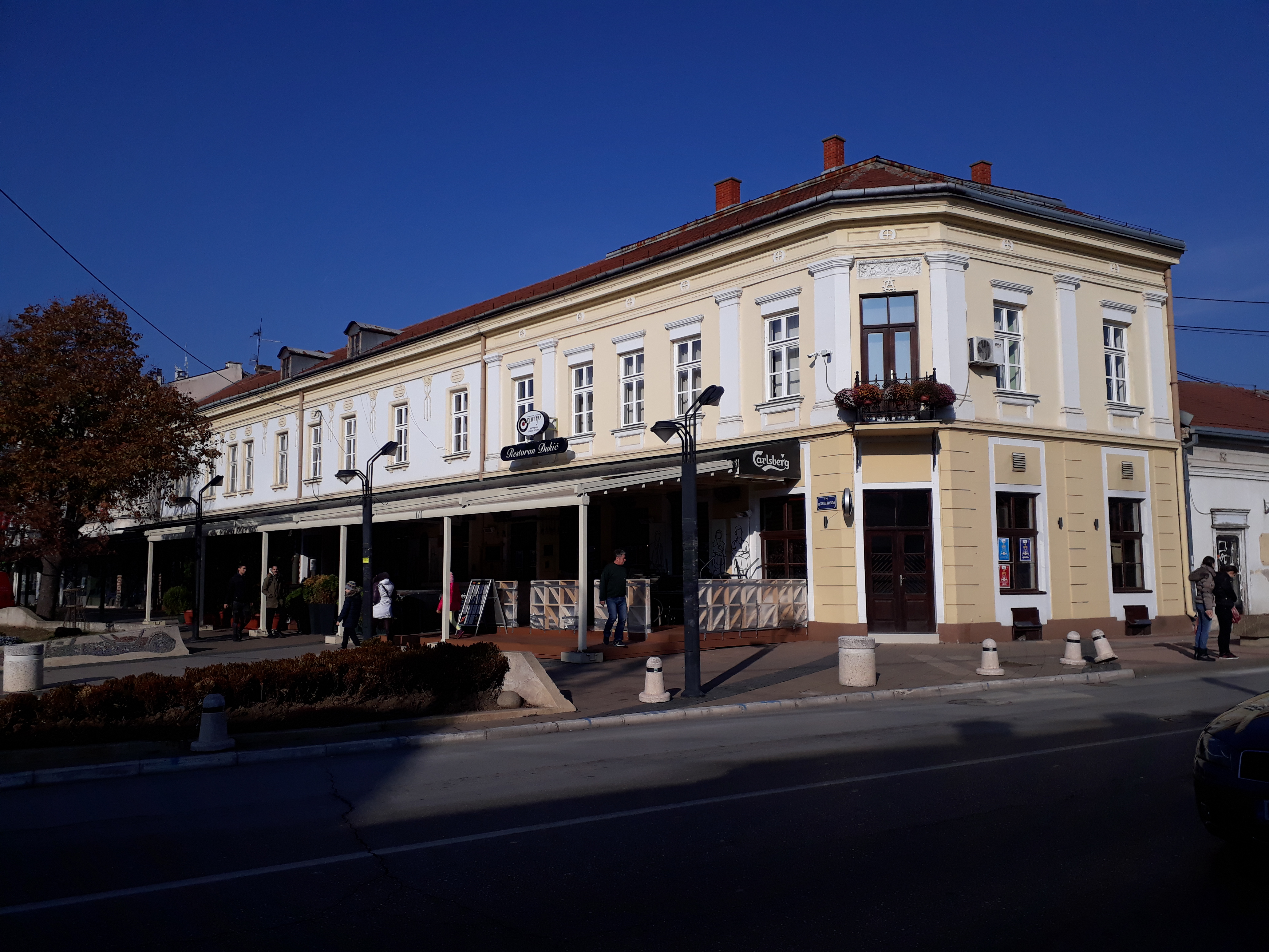 Gradska kafana "Central"